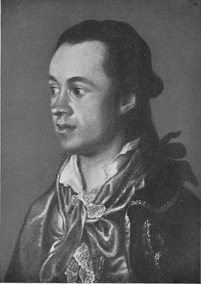 Friedrich Hildebrand von Einsiedel (1750-1828). Wie Carl Siegmund Freiherr von Seckendorff war auch Einsiedel, der 1776 Kammerherr bei der Herzogin-Mutter wurde, als Dichter, Übersetzer von Terenz und Calderon und Musiker begabt. Goethe und er bewahrten sich durch ihr ganzes Leben - Einsiedel starb als Oberappellationsgerichtspräsident in Jena - gegenseitige Freundschaft.